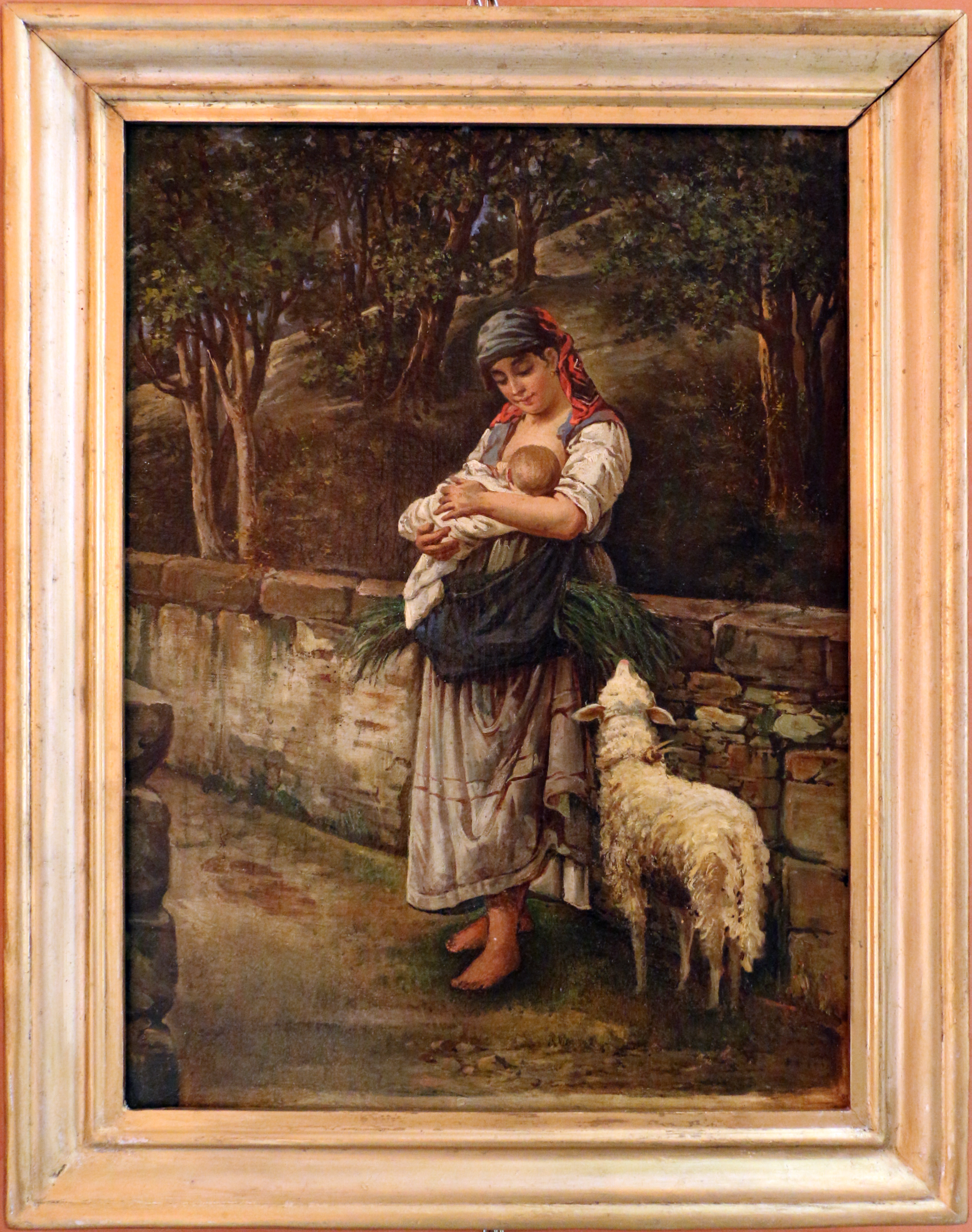 Pinacoteca civica di Reggio Calabria - paintings This is a photo of a monument which is part of cultural heritage of Italy.